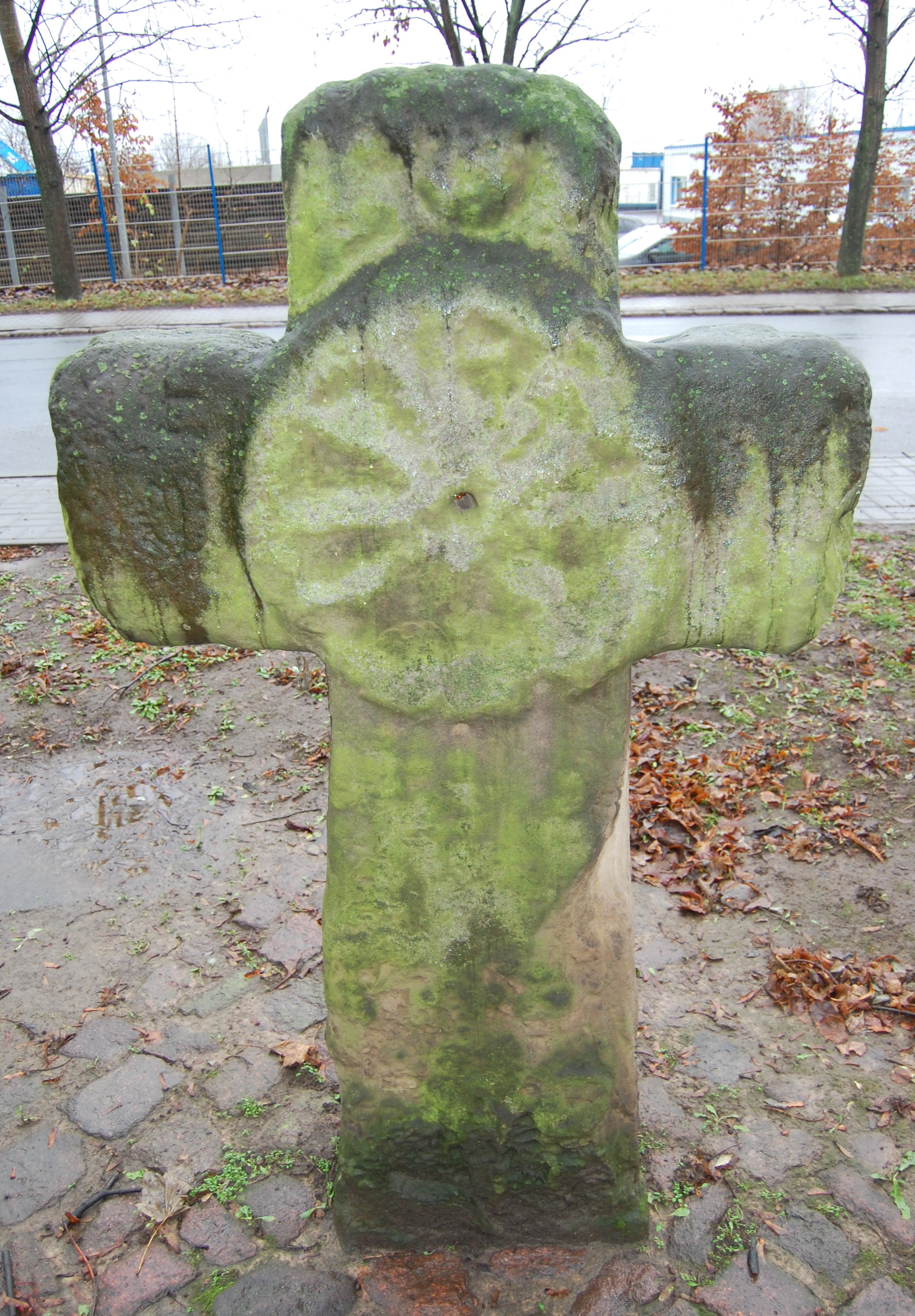 Steinkreuz in Welfesholz, Westseite mit Raddarstellung